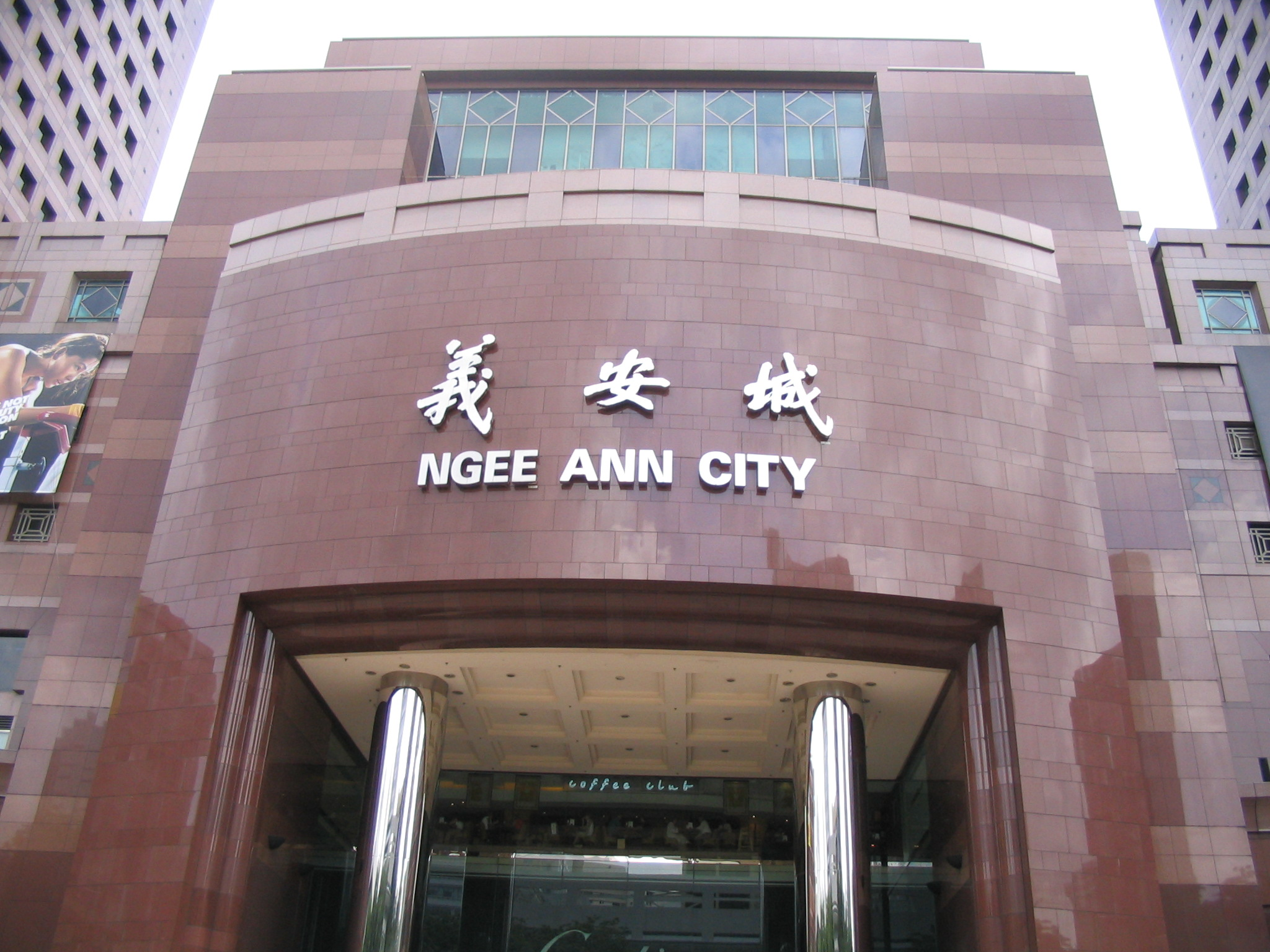 The Ngee Ann City Shopping Mall, located along shopping street Orchard Road, Singapore.